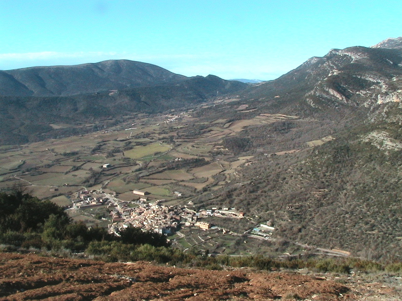 Vista de Vilanova de Meià des del cim del Cogulló (Noguera - Catalunya)